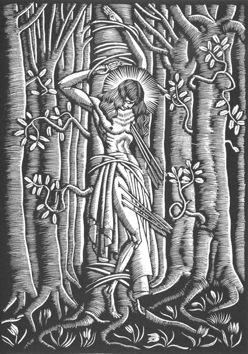 Św Sebastian, wood engraving